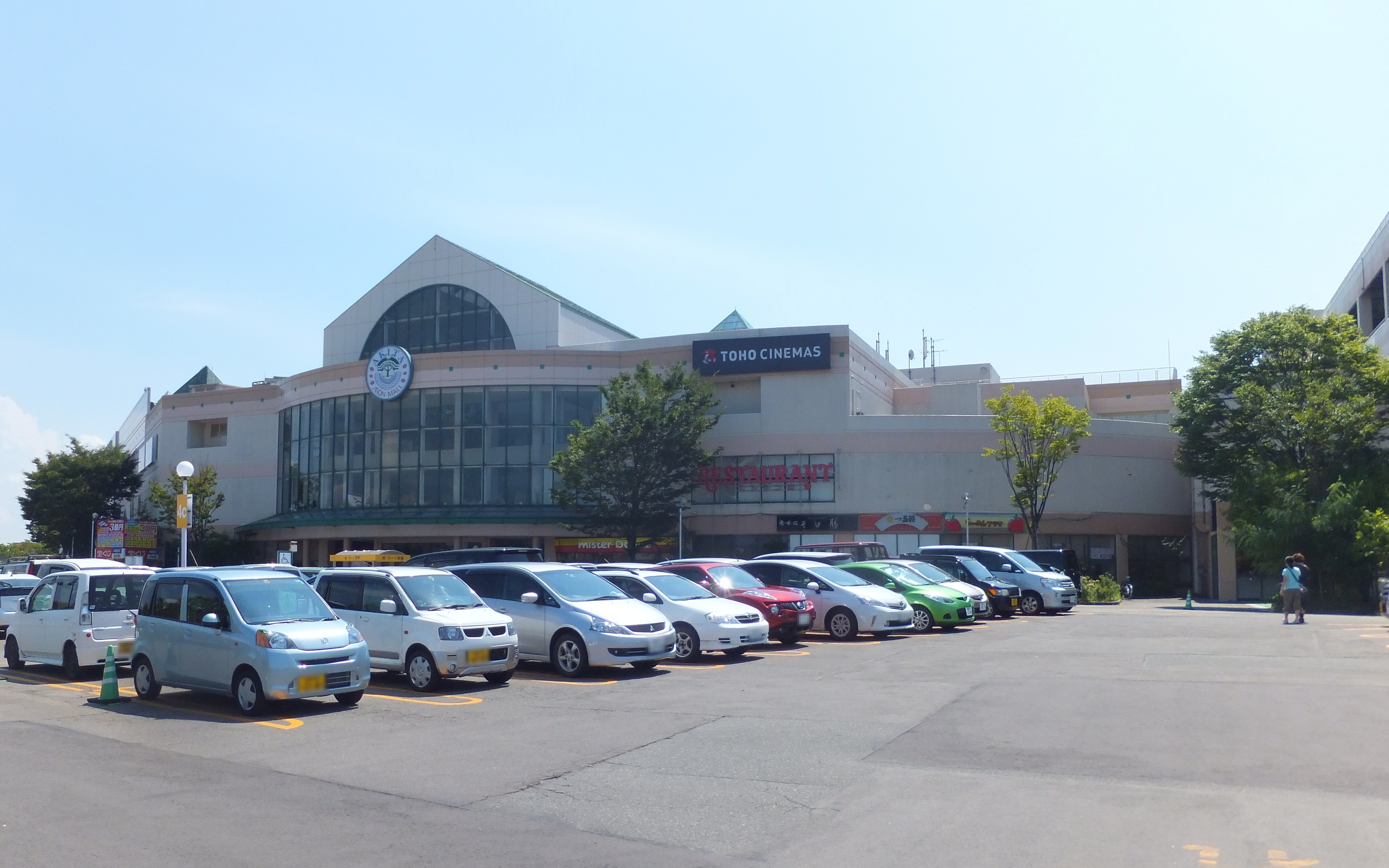 イオンモール秋田